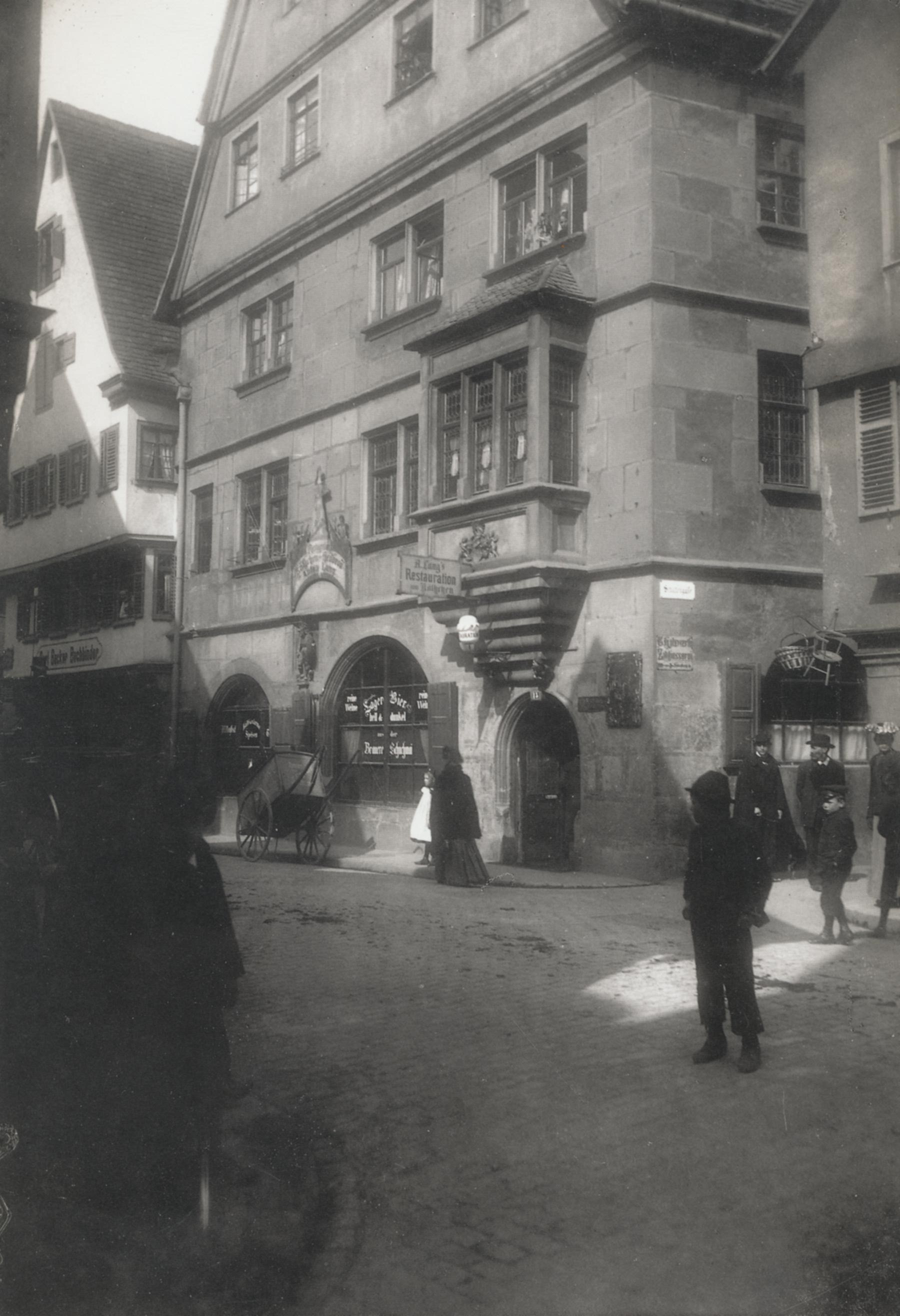 Gaststätte "Käthchen von Heilbronn" in Heilbronn. Aufnahme von Herzog Philipp von Württemberg (1838–1917) vom 21. März 1904